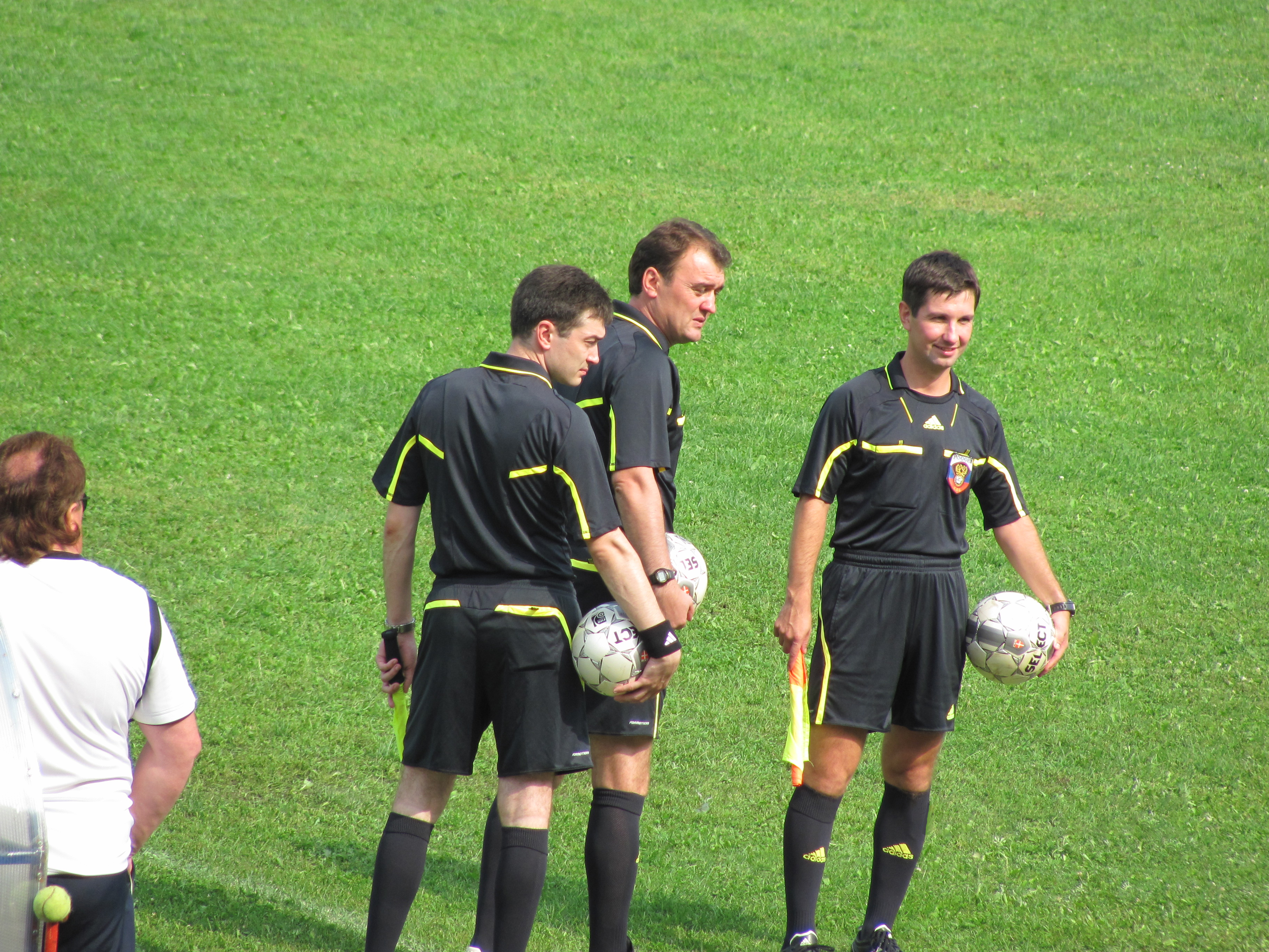 Бригада Судей